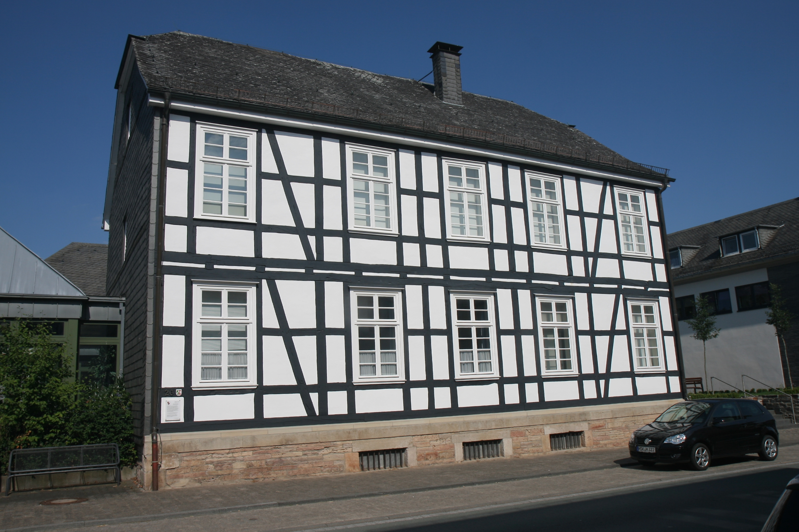 Museum der Stadt Medebach, Oberstraße 26 in Medebach. This image shows a heritage building in Germany, located in the North Rhine-Westphalian city Medebach (no. 26).